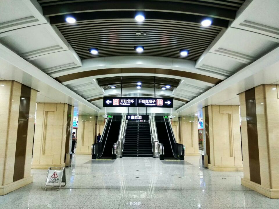 长春地铁儿童公园站站台